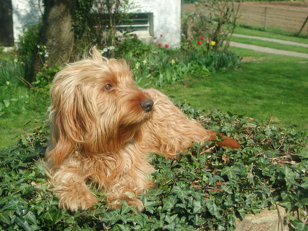 A Basset Fauve de Bretagne named Scoop.